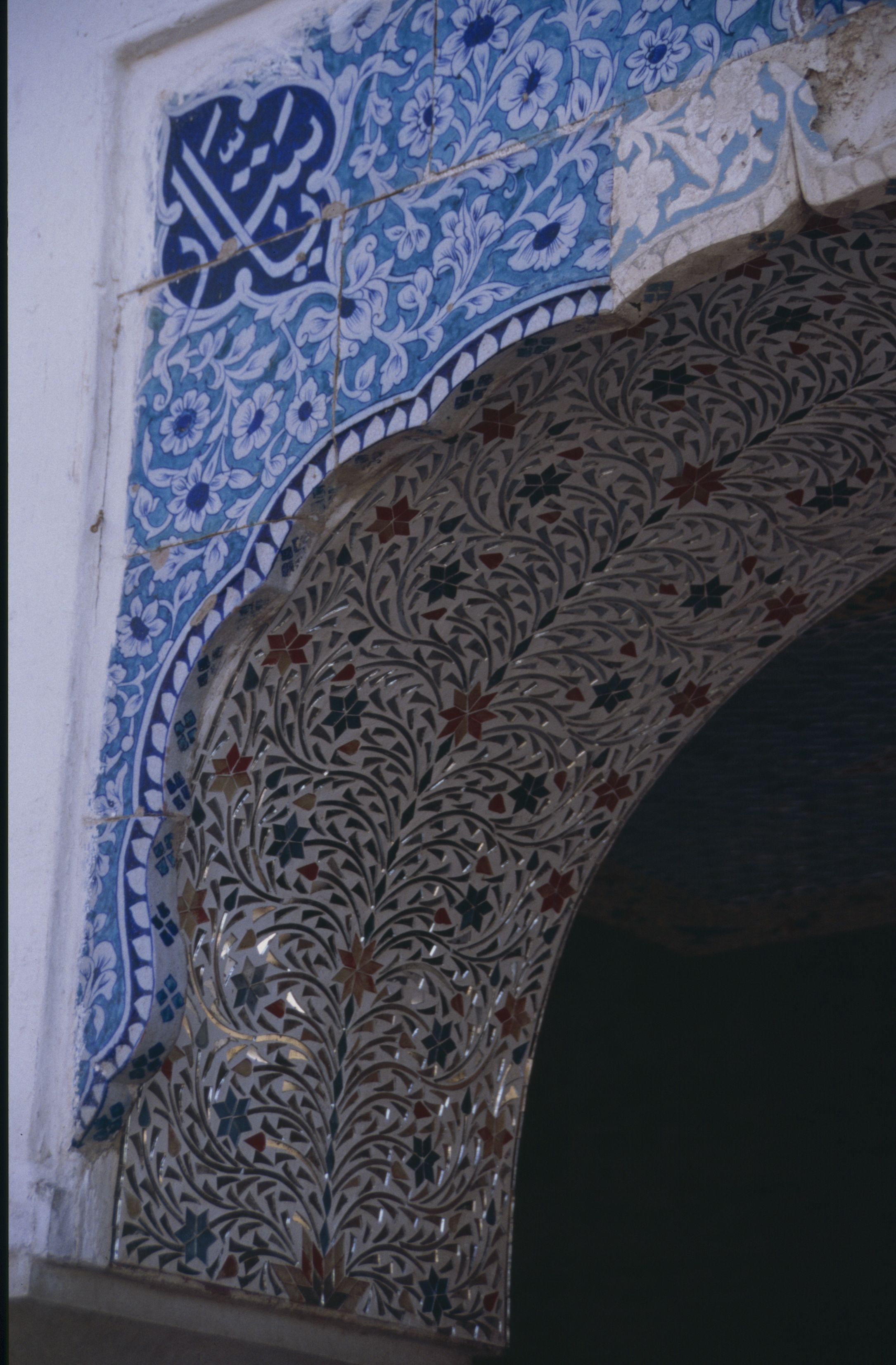 Multan, Zakariya-Grabmal, Detail